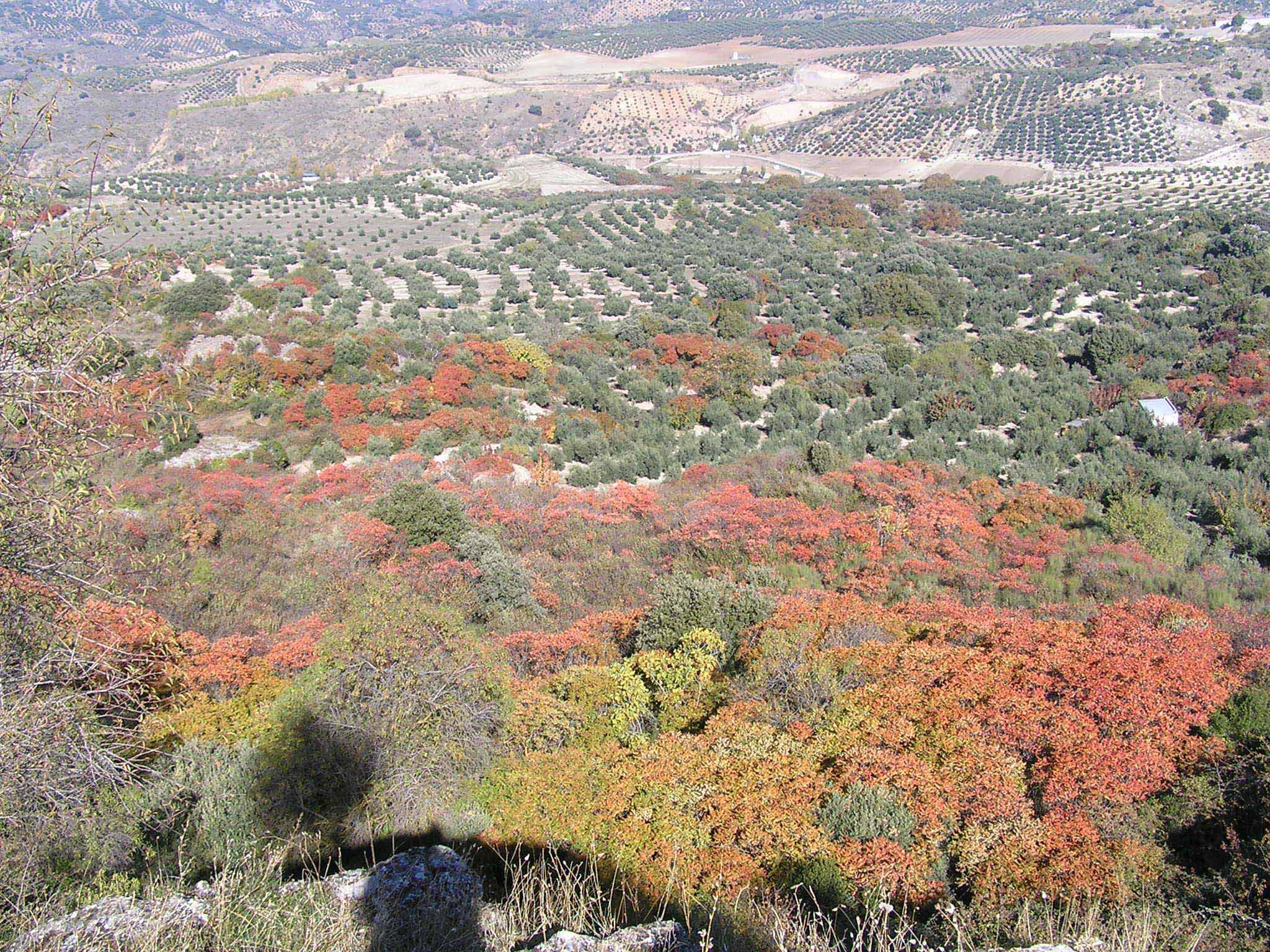 Zumaques y olivos de Alcalá la Real,Jaén,España. Cultivo de zumaques.